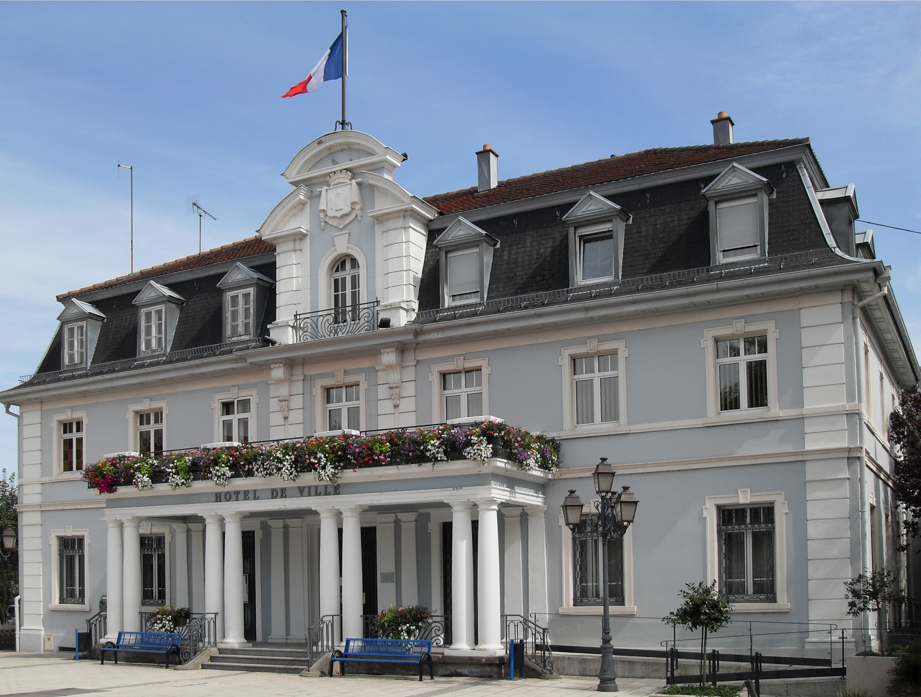 L'hôtel de ville de Cernay